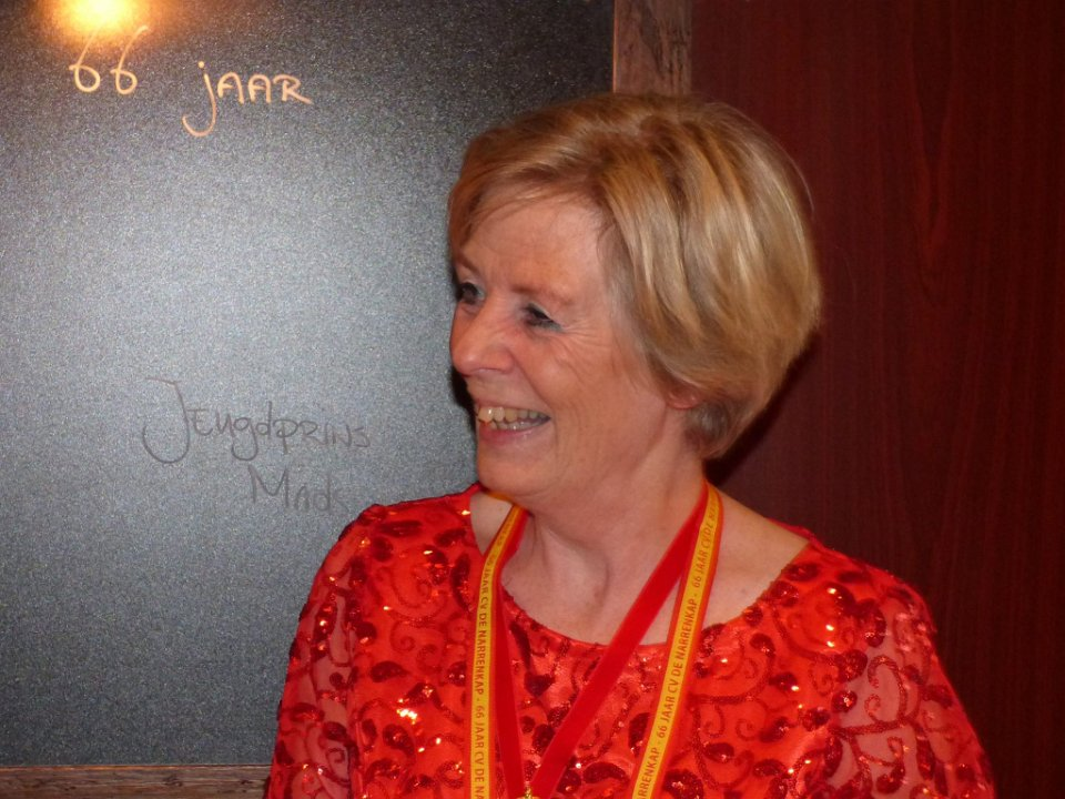 Petra van Wingerden-Boers aanwezig bij receptie van de Koninklijk erkende carnavalsvereniging de Narrenkap uit Velp.